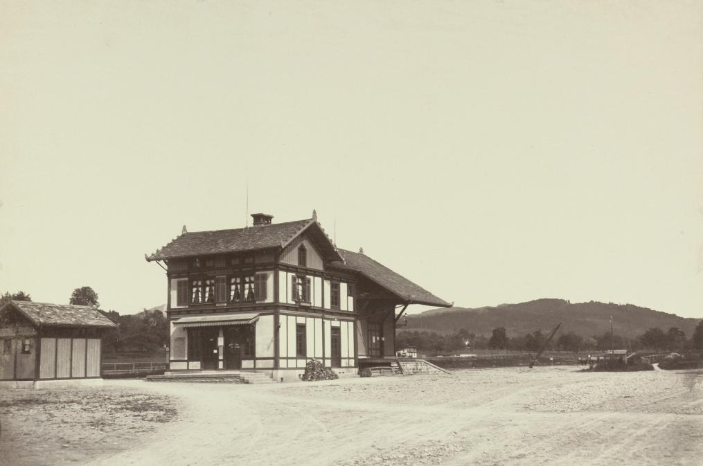 Bahstrecke Effretikon-Hinwil: Station Pfäffikon